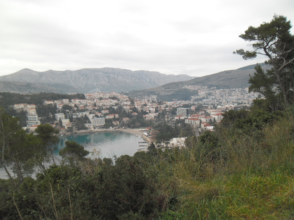 pogled iz park-šume (Petka), Dubrovnik